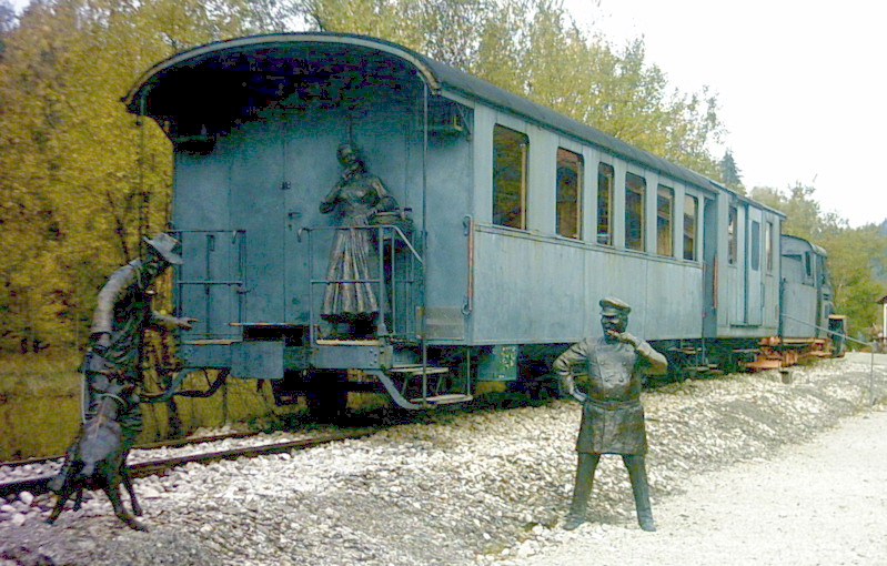 Szene aus dem Lied in Bronze gegossen vor einem alten Dampfzug am ehemaligen Bahnhof Durlesbach. Personenwagen ex Öchsle Nr. 11 ex Berner Oberland-Bahn AB3 151 (1928), Packwagen ex Öchsle ex Frauenfeld-Wil-Bahn D 65 (1903)